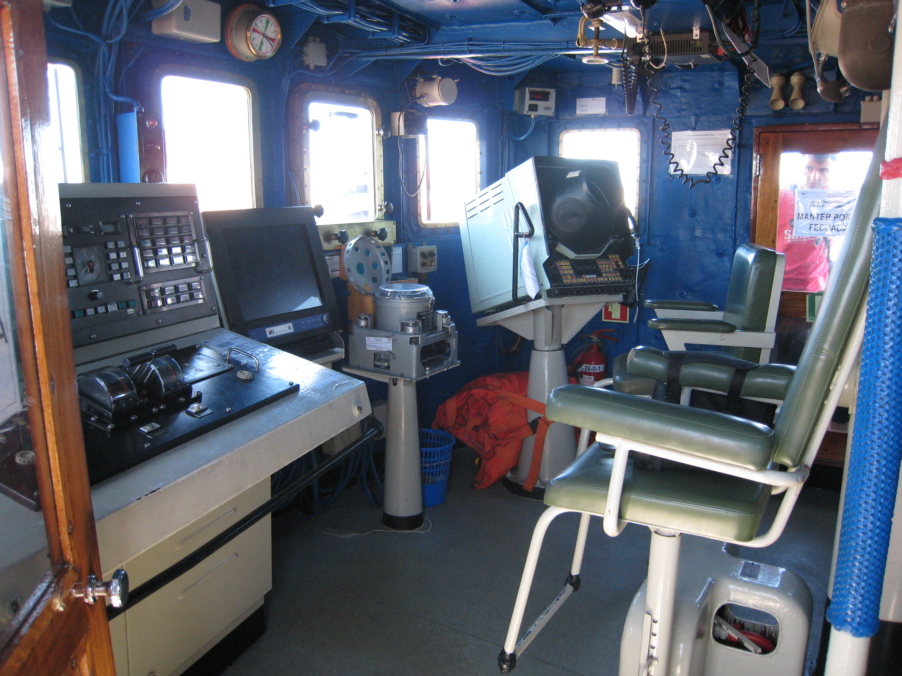 Ponte do NRP Cacine (P1140), fundeado na marina de Peniche.